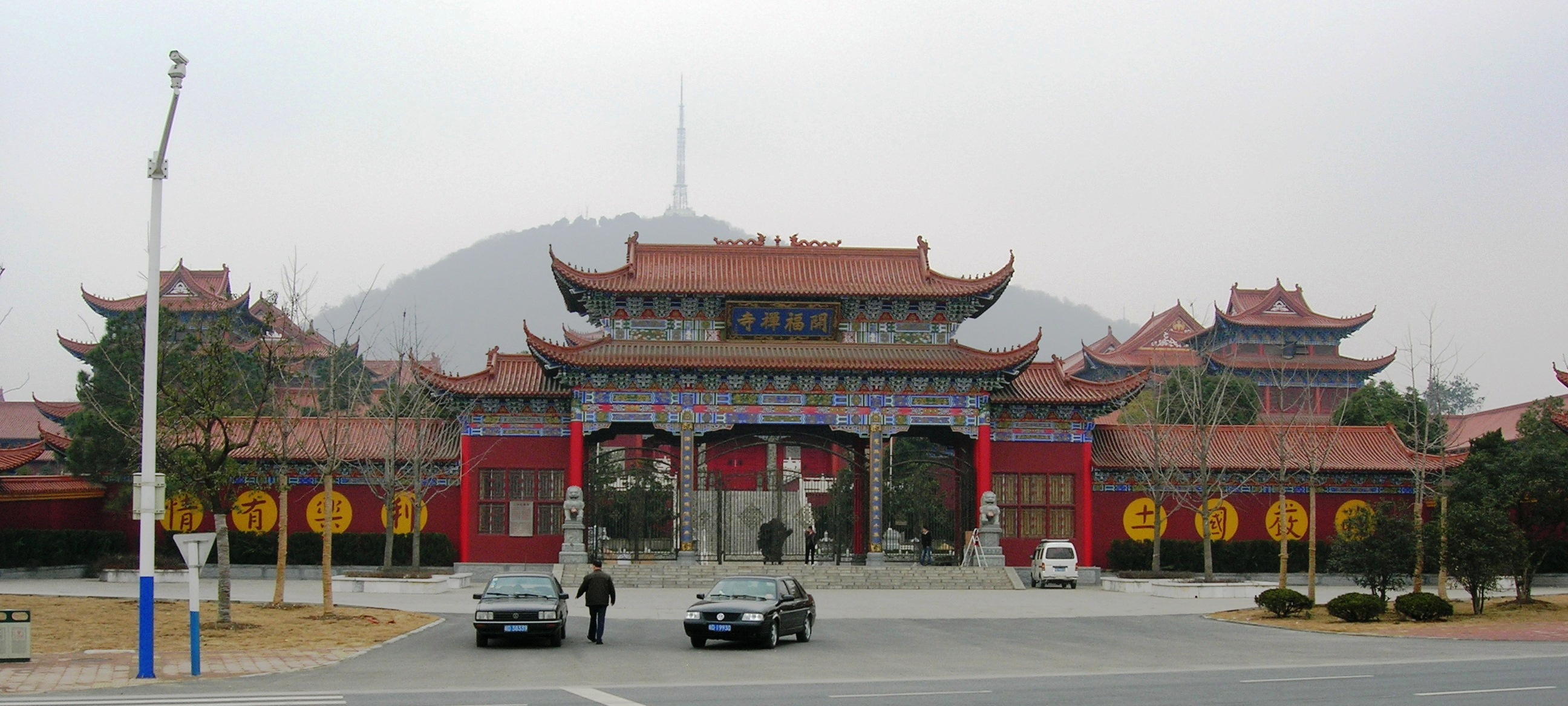 合肥市大蜀山麓-开福寺